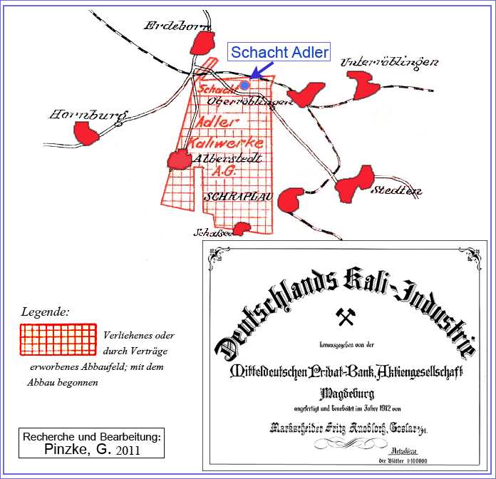 Lageplan des Schachtes Adler und die Berechtsame der ehemaligen "Adler-Kaliwerke A.G."